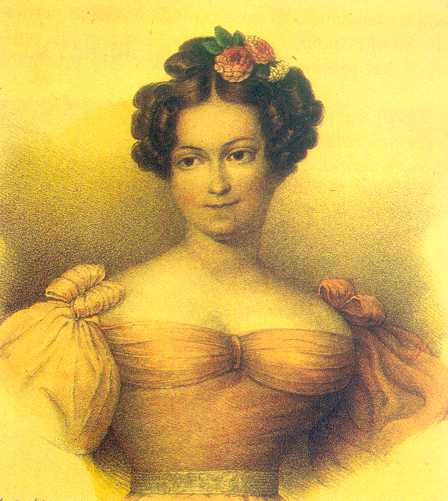 Retrato